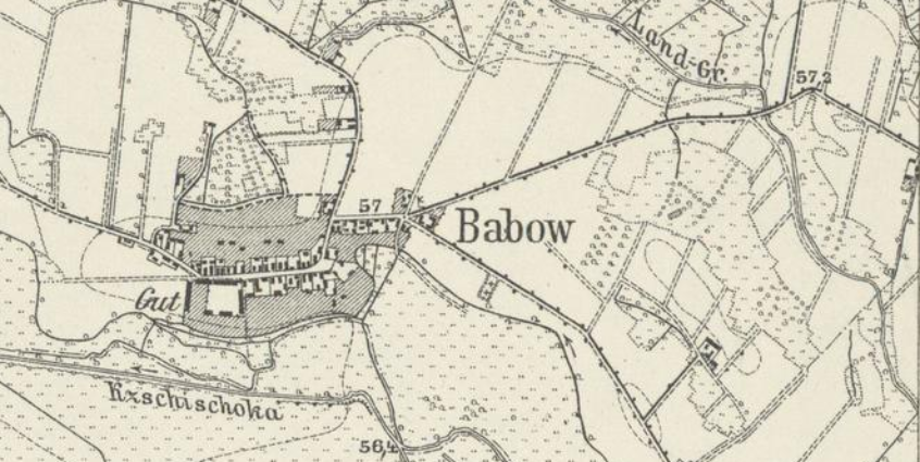 Babow, Ortsteil der Gemeinde Kolkwitz, Lkr. Spree-Neiße, Brandenburg, Ausschnitt aus dem Messtischblatt 4250 Vetschau/Spreewald von 1917 (Neudruck 1917)